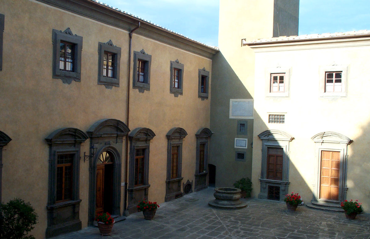 Castello di Montegufoni - Corte